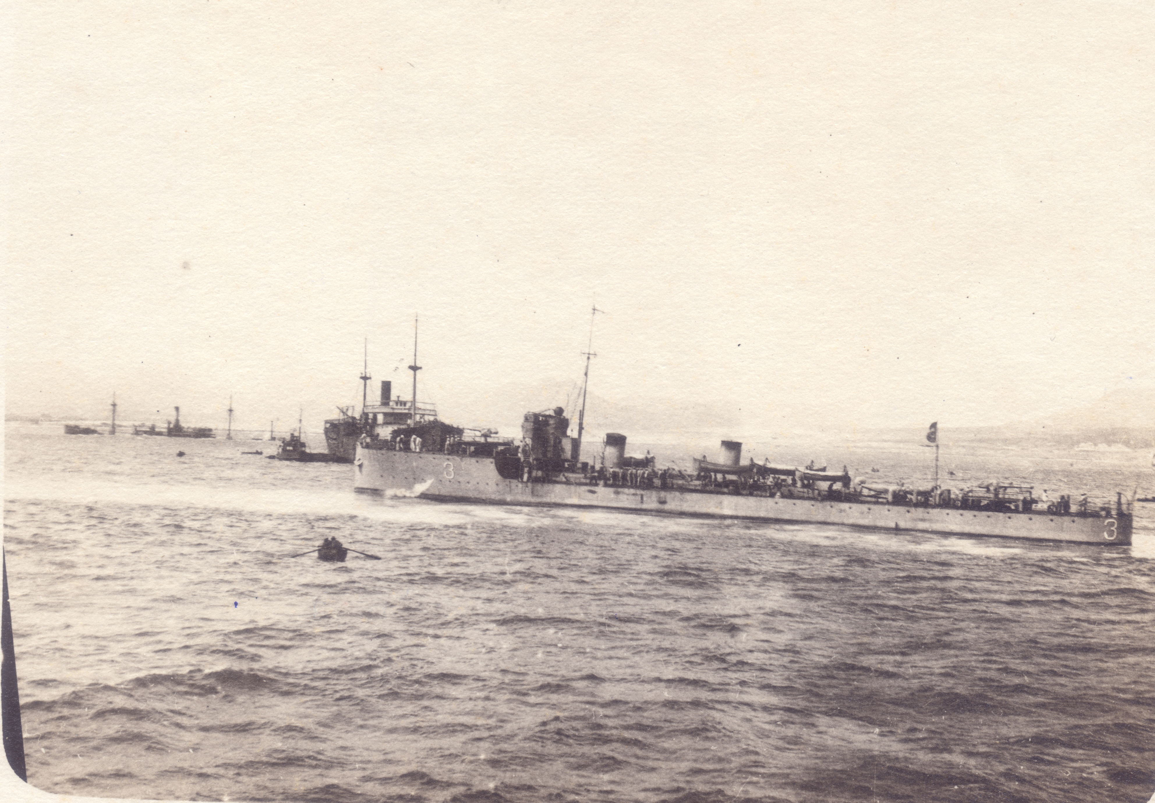 O Contratorpedeiro Piauí na campanha da D.N.O.G., Gibraltar, 1919. Arquivo liberado pela Marinha do Brasil através de projeto GLAM com Wiki Educação Brasil